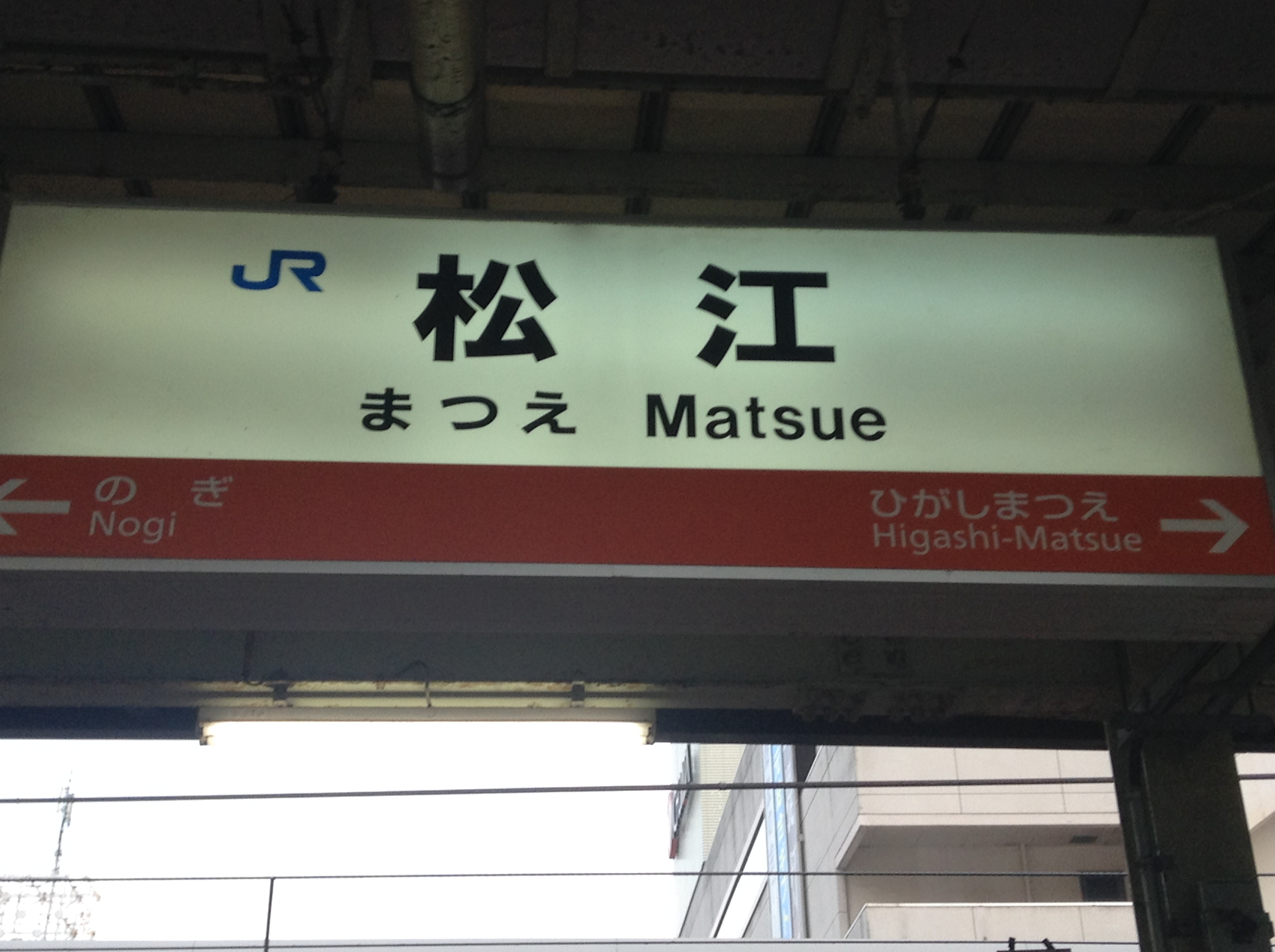 松江駅の駅名標2016年(平成28年)以降のもの